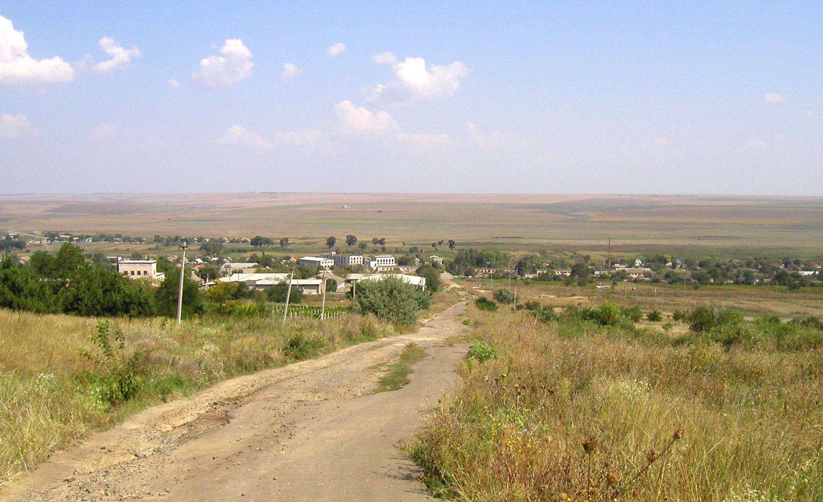 Wessela Dolyna (Tarutyne)